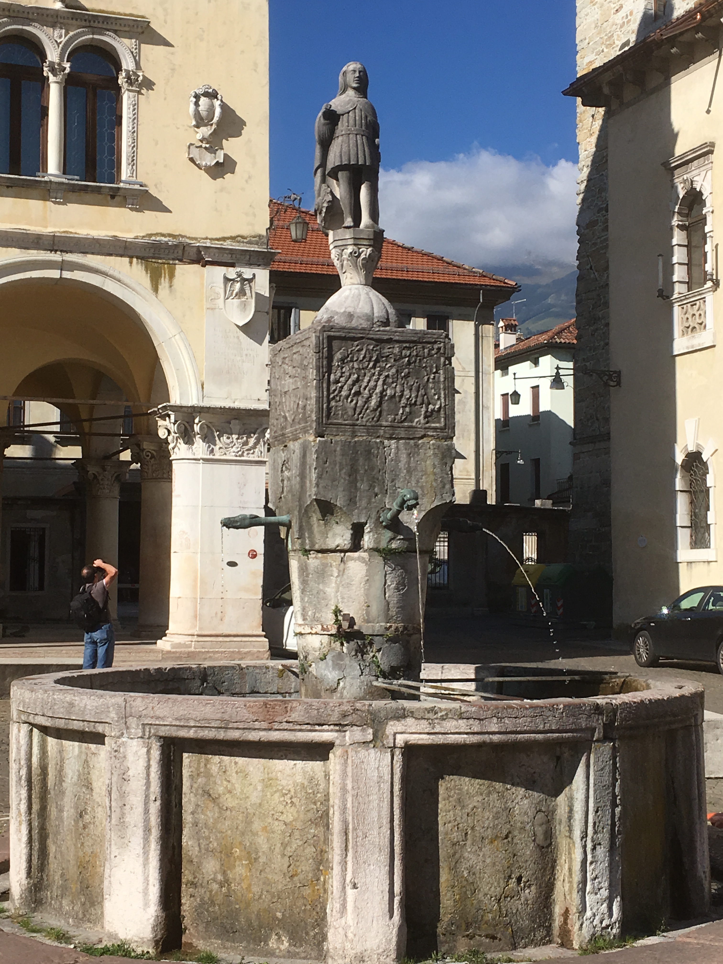 Fontana di San Giostà This is a photo of a monument which is part of cultural heritage of Italy.